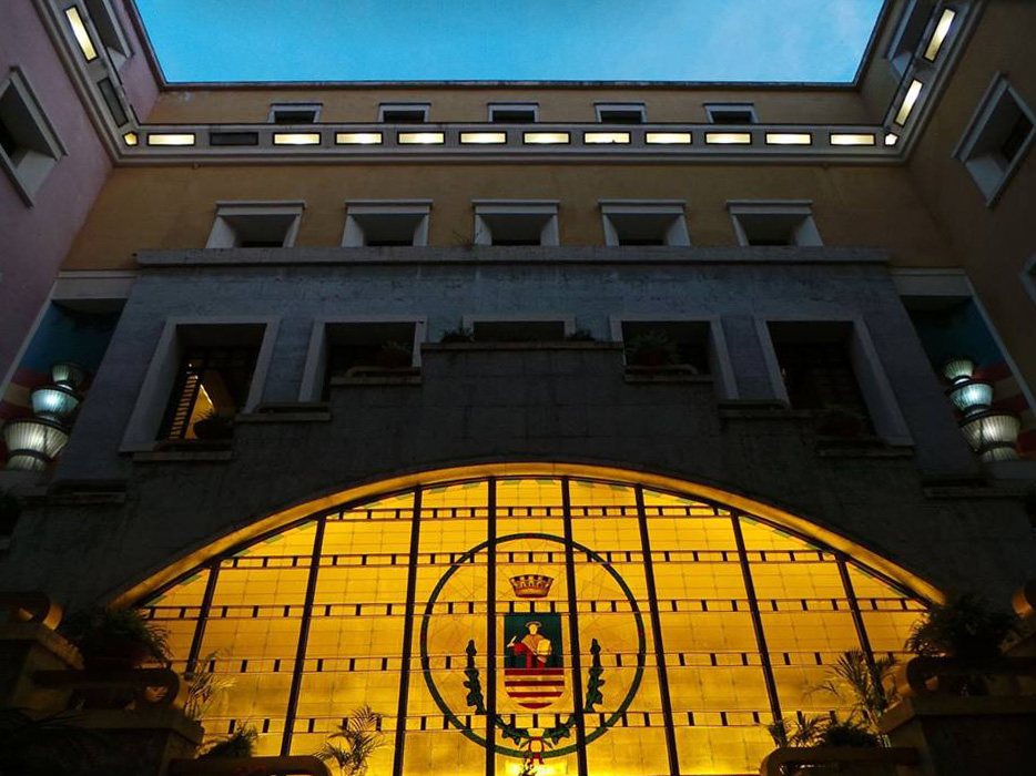 Cortile palazzo di Città di Salerno